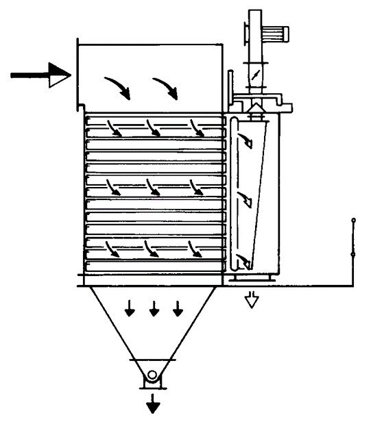 Schéma de fonctionnement d'un filtre à manches horizontales